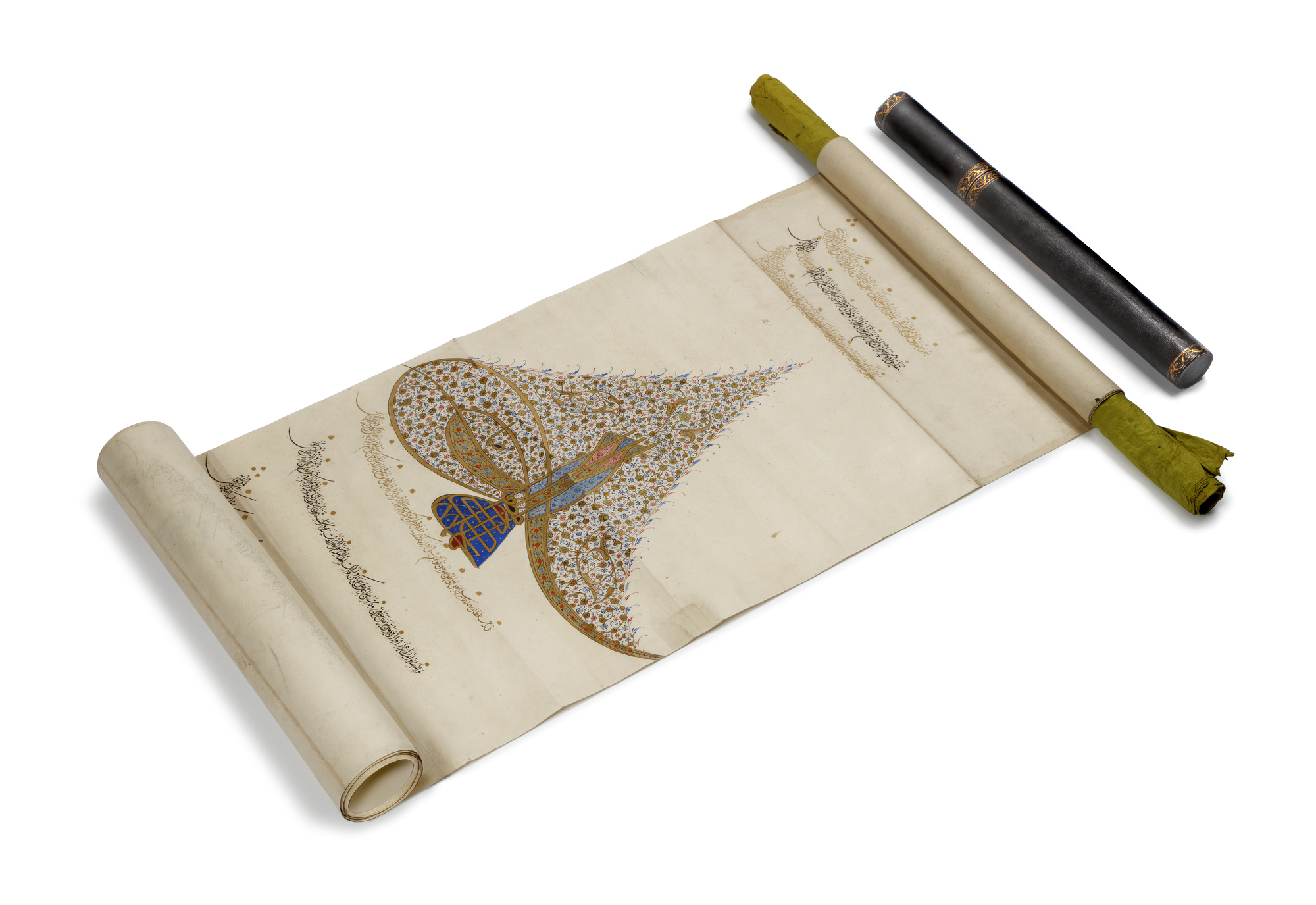 Handelsverdrag NL en Ottomaanse Rijk Staten-Generaal, inventarisnummer 12593.15B1